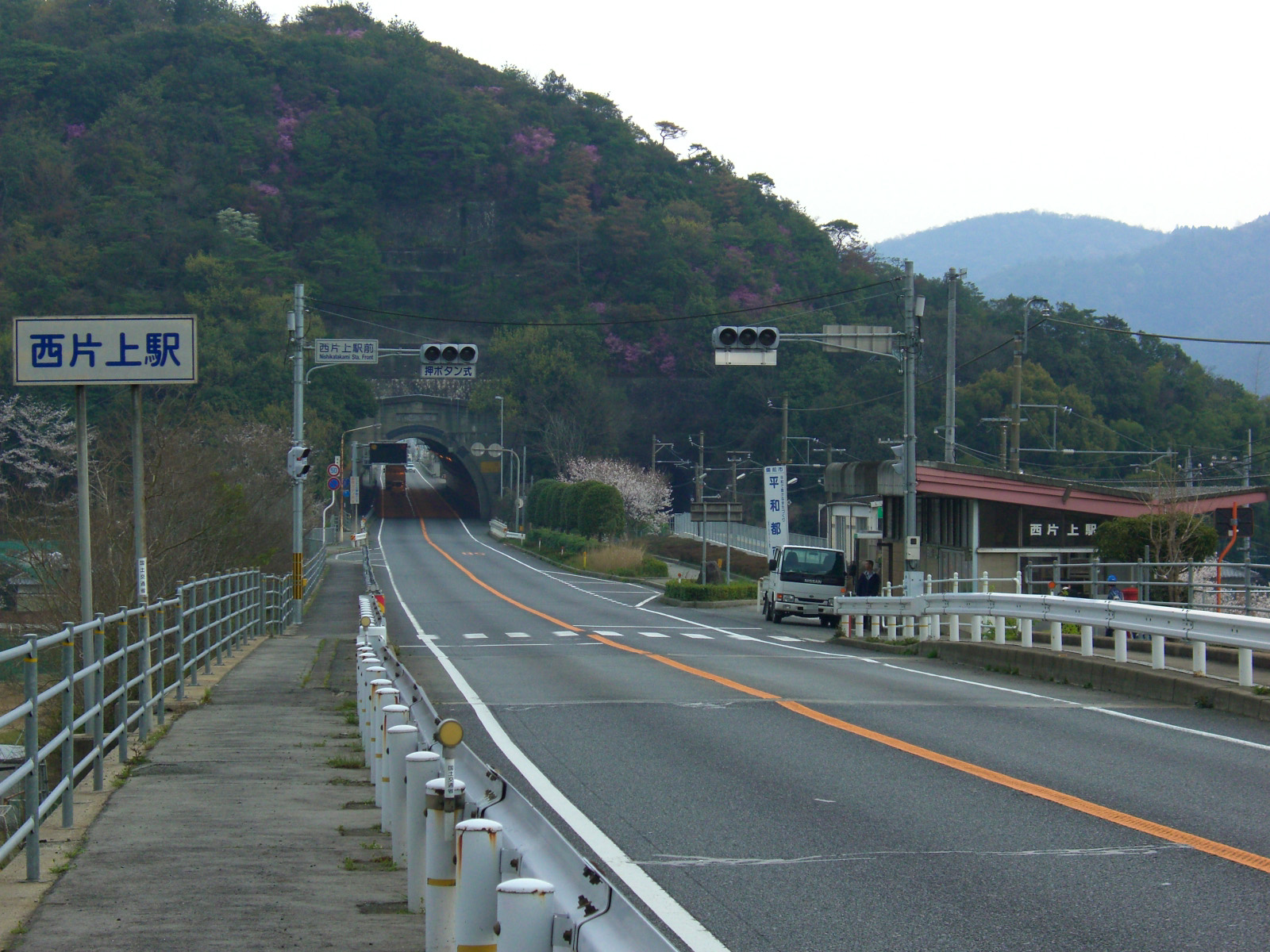 Japan Route 2 & JR-WEST Nishi-Katakami Station 日本の国道2号とJR西日本西片上駅駅舎